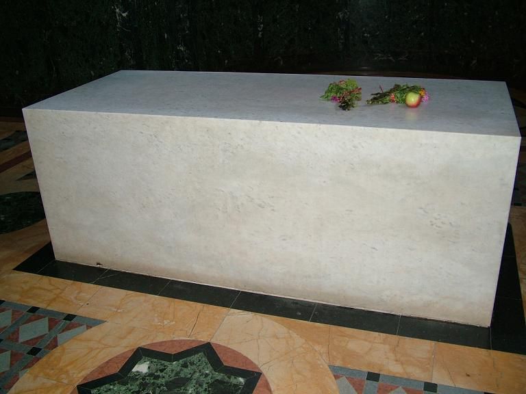 Karađorđe Petrović's grave in Topola, Serbia/Le tombeau de Karageorges à Topola, Serbie